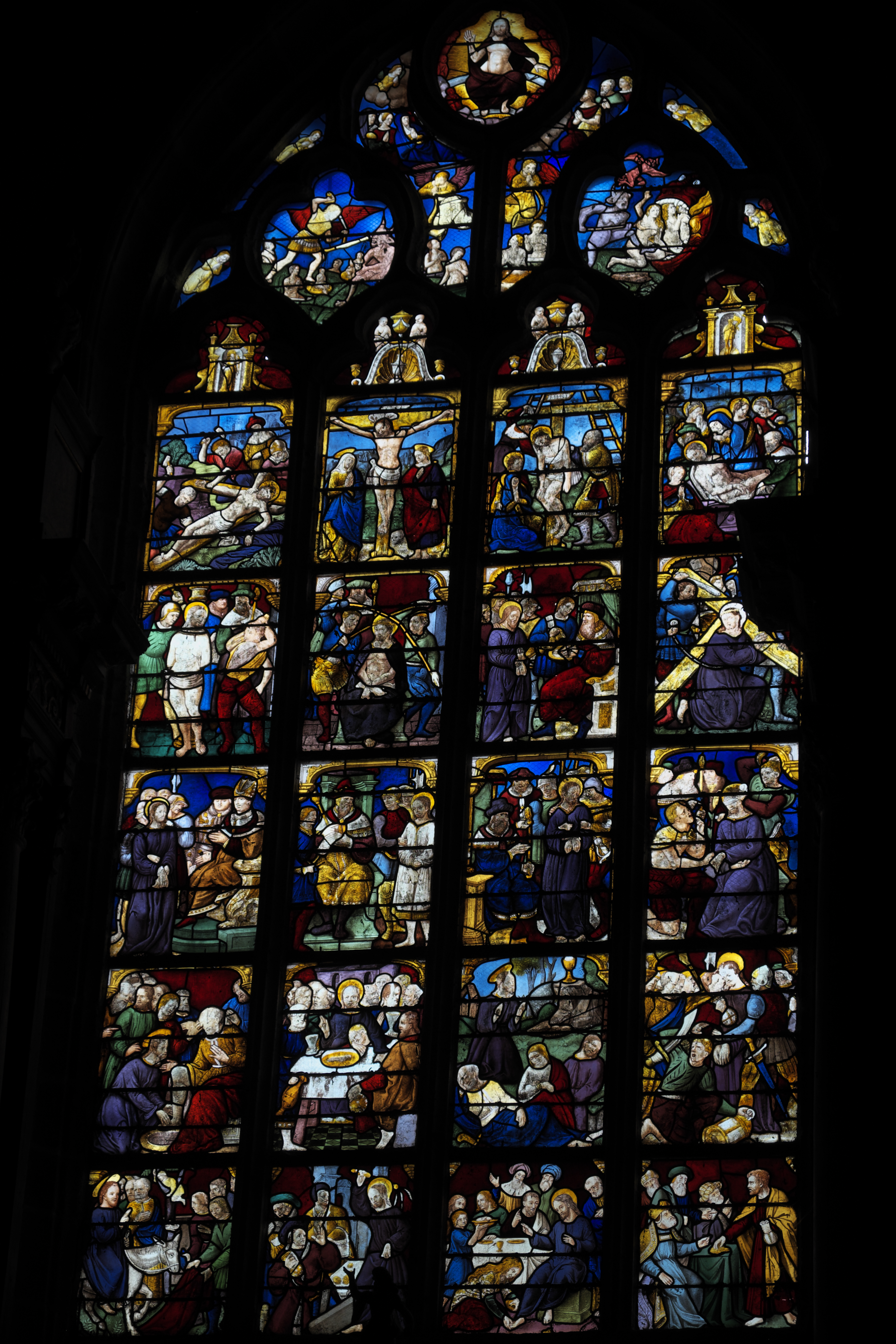 Katholische Pfarrkirche Saint-Ouen in Les Iffs im Département Ille-et-Vilaine (Region Bretagne/Frankreich), Bleiglasfenster (baie 0) um 1530, Darstellung: Szenen der Passion Christi